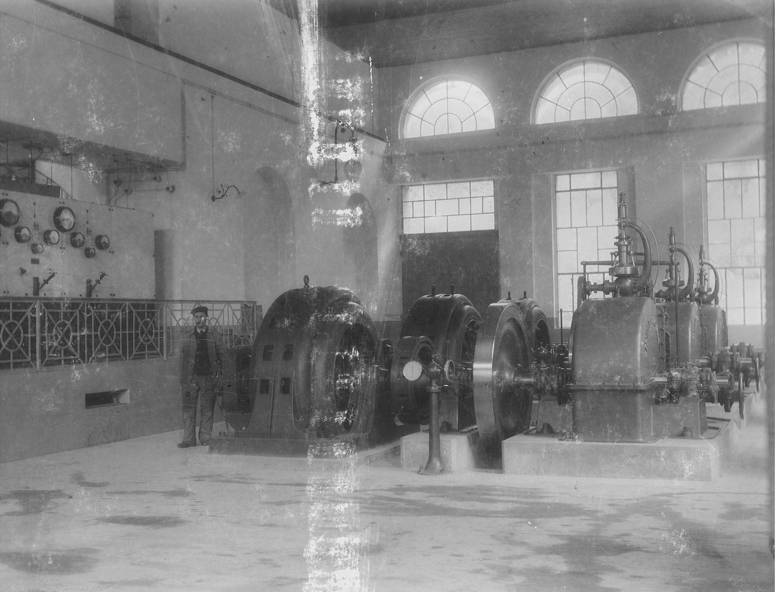 Kraftwerk Morobbia: Innenansicht der Zentrale Giubiasco 1903 mit den drei damals aufgestellten Maschinengruppen zu je 660 PS.